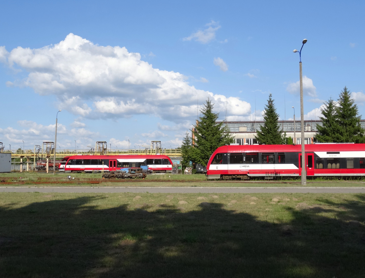 Baza autobusów szynowych Arriva RP na terenie OLPP Nowa Wieś Wielka, powiat bydgoski